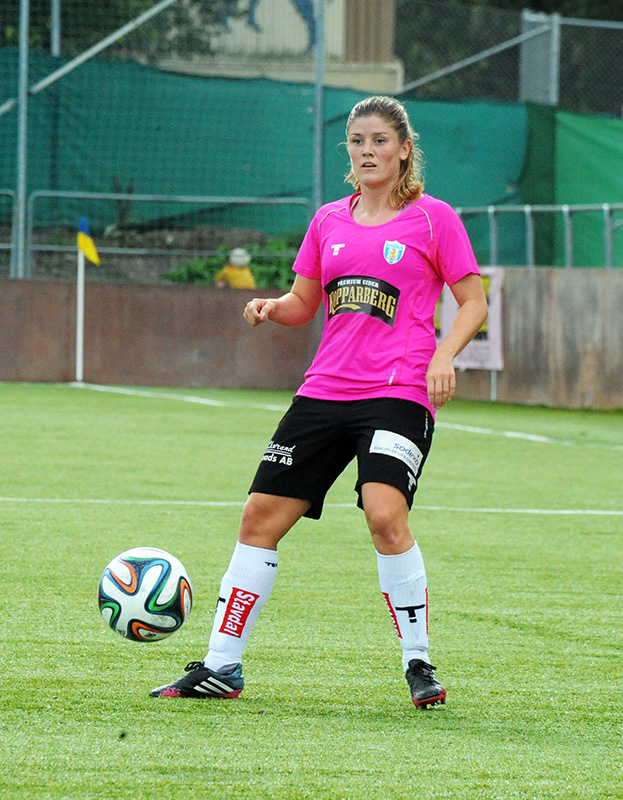 Maren Mjelde